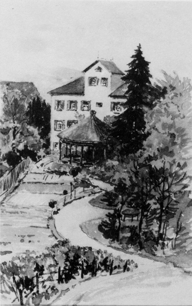 Gartenseite des Hartmann-Reinbeckschen Hauses in Stuttgart, Friedrichstraße 14, Aquarell von Wilhelm Weisser (1864–1940), 1939, nach einer unvollendeten Zeichnung von Sofie Weisser, um 1860.